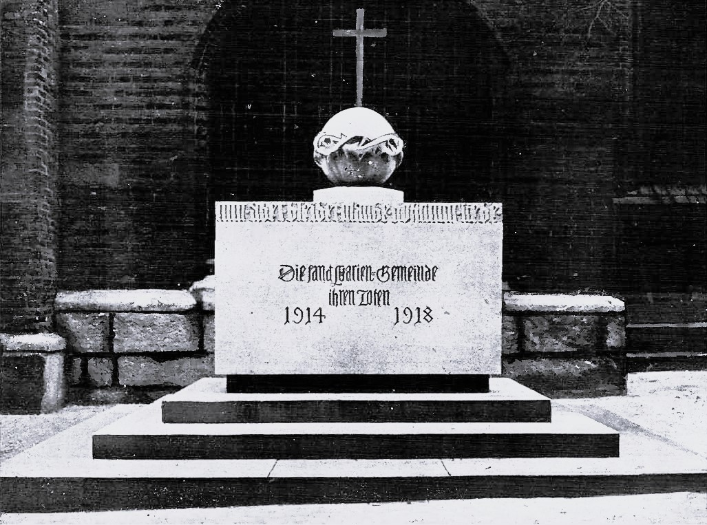 Gesamtansicht des Ehrenmals zu St. Marien nach dem Entwurf von Herm. Joachim Pagels vor der Bürgermeisterkapelle.